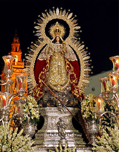 Nª Sª de Montemayor, patrona de Moguer (Huelva), durante la procesión del 8 de septiembre.